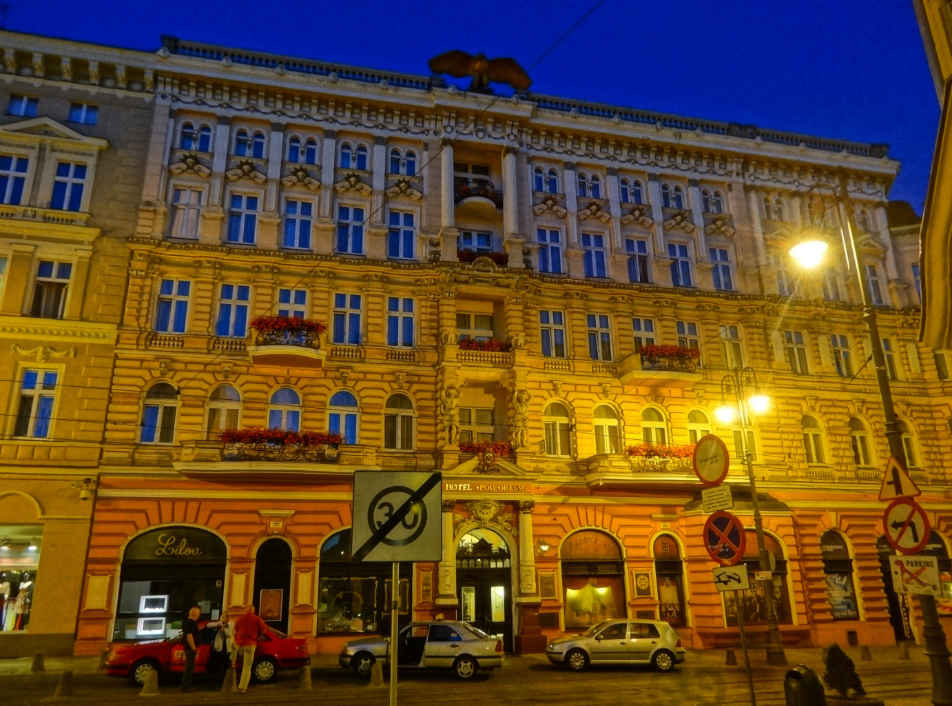 Hotel Pod Orłem w Bydgoszczy przy ul. Gdańskiej 14 (zbud. 1896, Józef Święcicki)